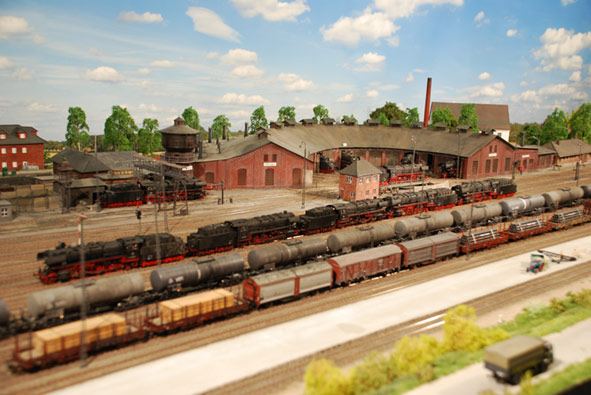 Modell des Bahnbetriebswerks Ottbergen in der Modellbundesbahn (ehemals „MO187“) in Bad Driburg, Deutschland.